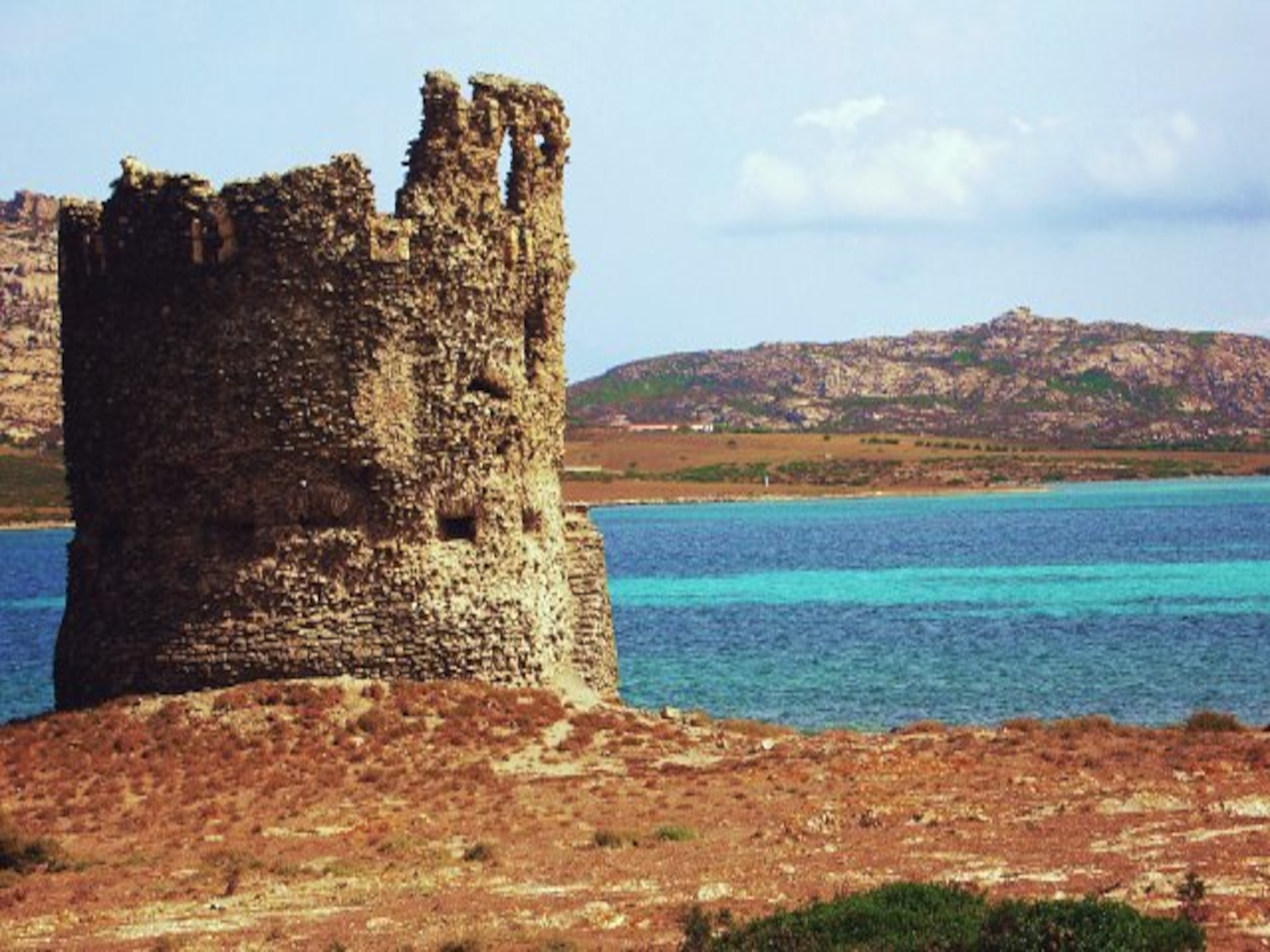 Torre Della Finanza